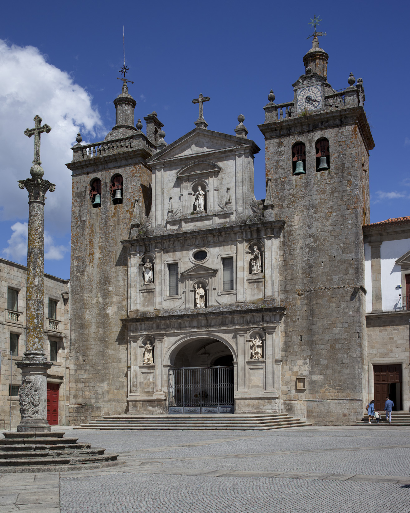 Sé de Viseu